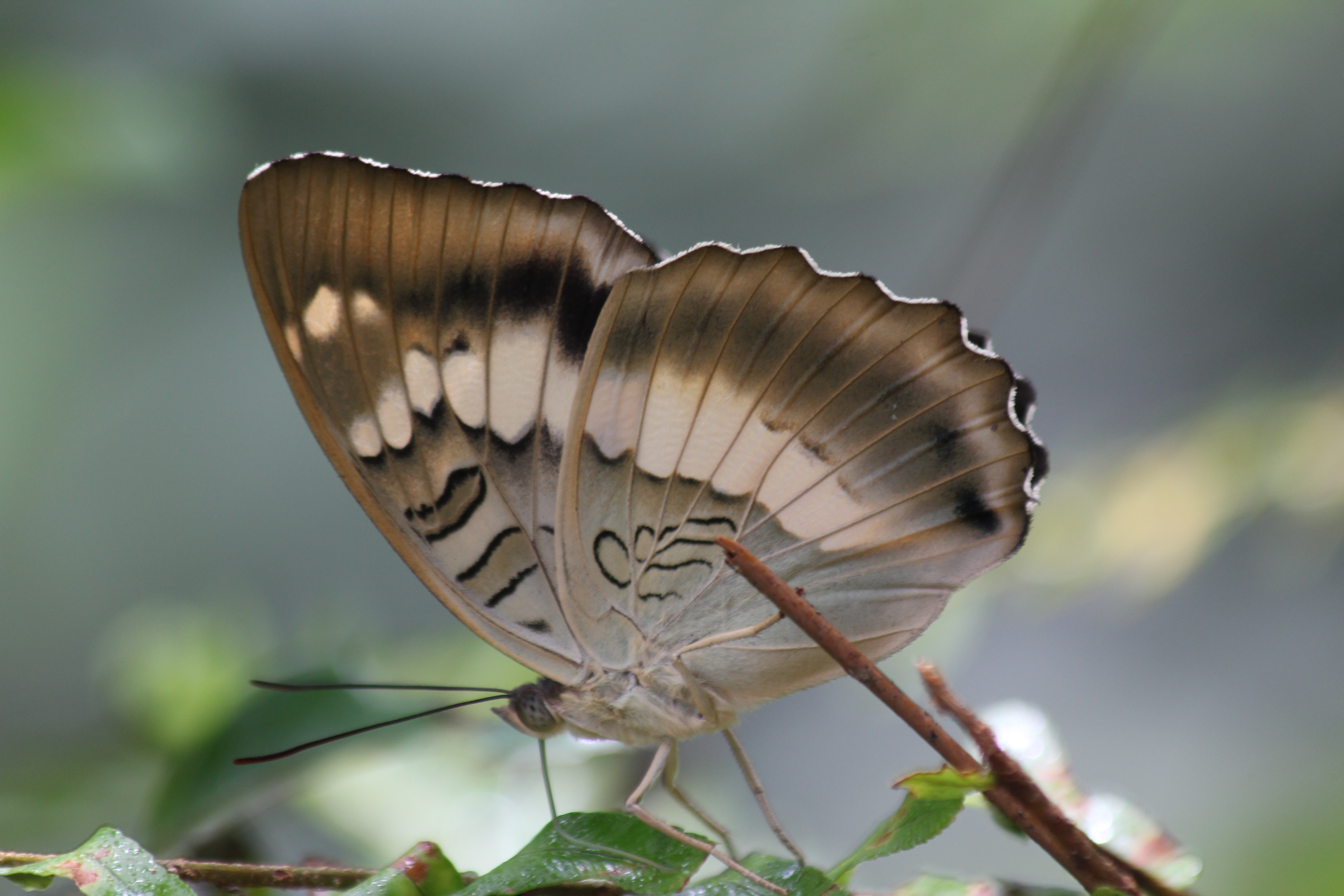 352台灣綠蛺蝶6(郭月秀攝)